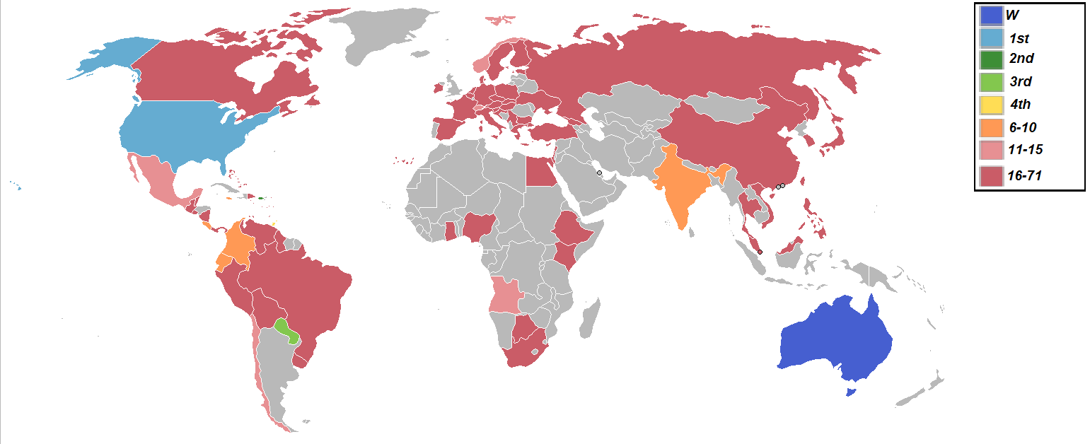 jejejejejejejeje